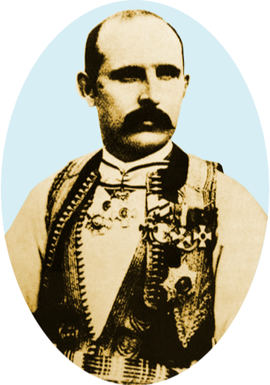 Srpski (latinica): Mitar Bakić, crnogorski konzul u Carigradu, od 1896.